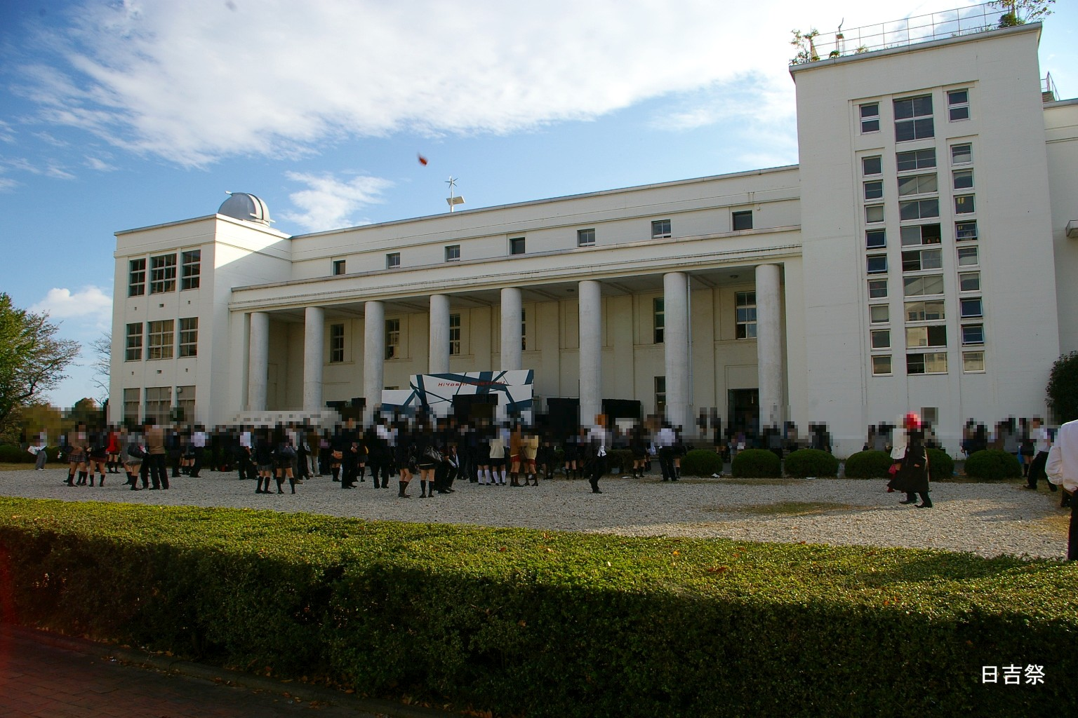 2009.11日本国内で塾生 (talk)が撮影。